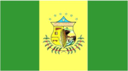 Bandera de Jacaltenango, Huehuetenango